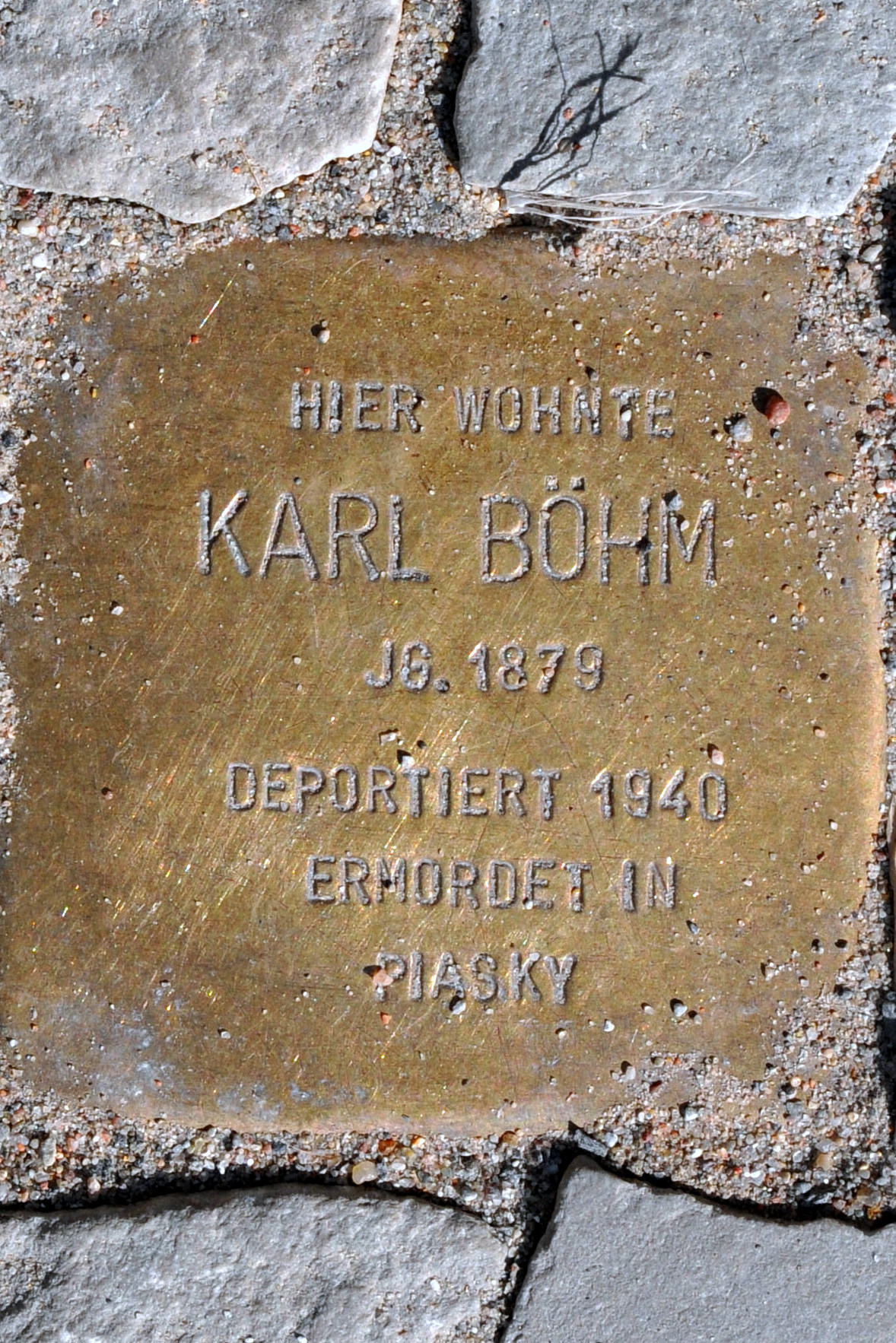 Stolperstein für Karl Böhm in Stralsund.